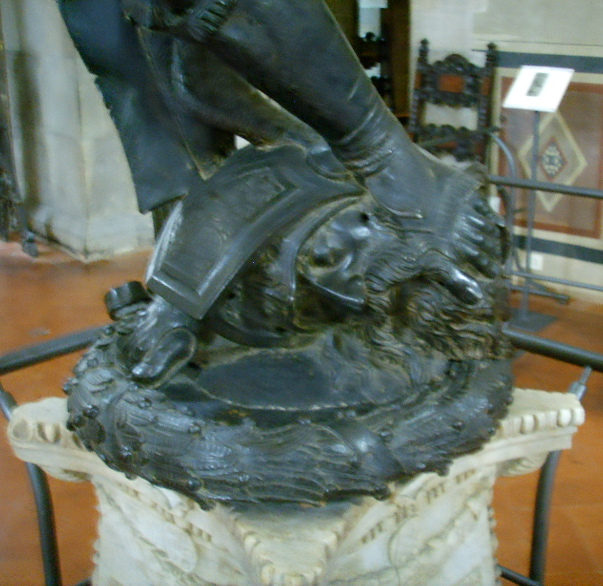 Donatello, david